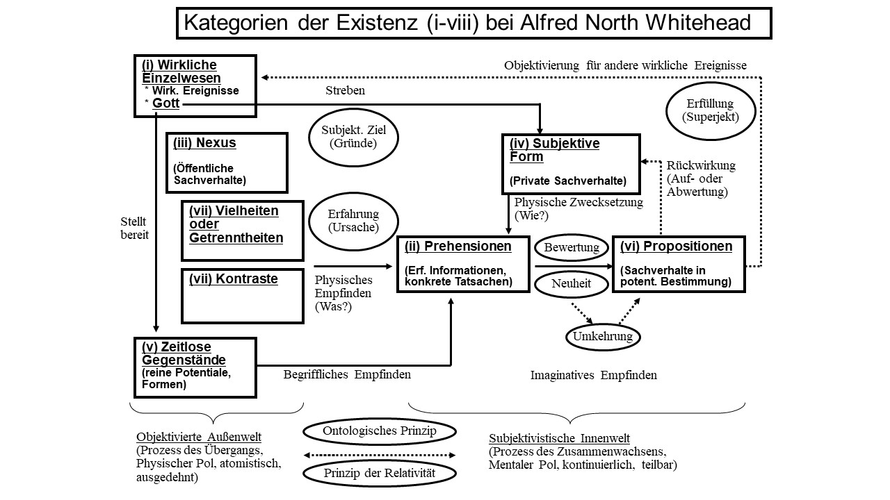 Graphik zur Erläuterung der Kategorien der Existenz in Prozess und Realität von Alfred North Whitehead